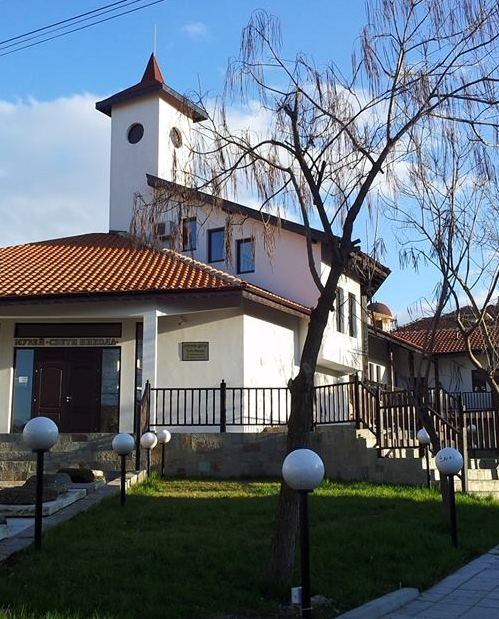 Панорамна снимка на Музей " Свети Никола "